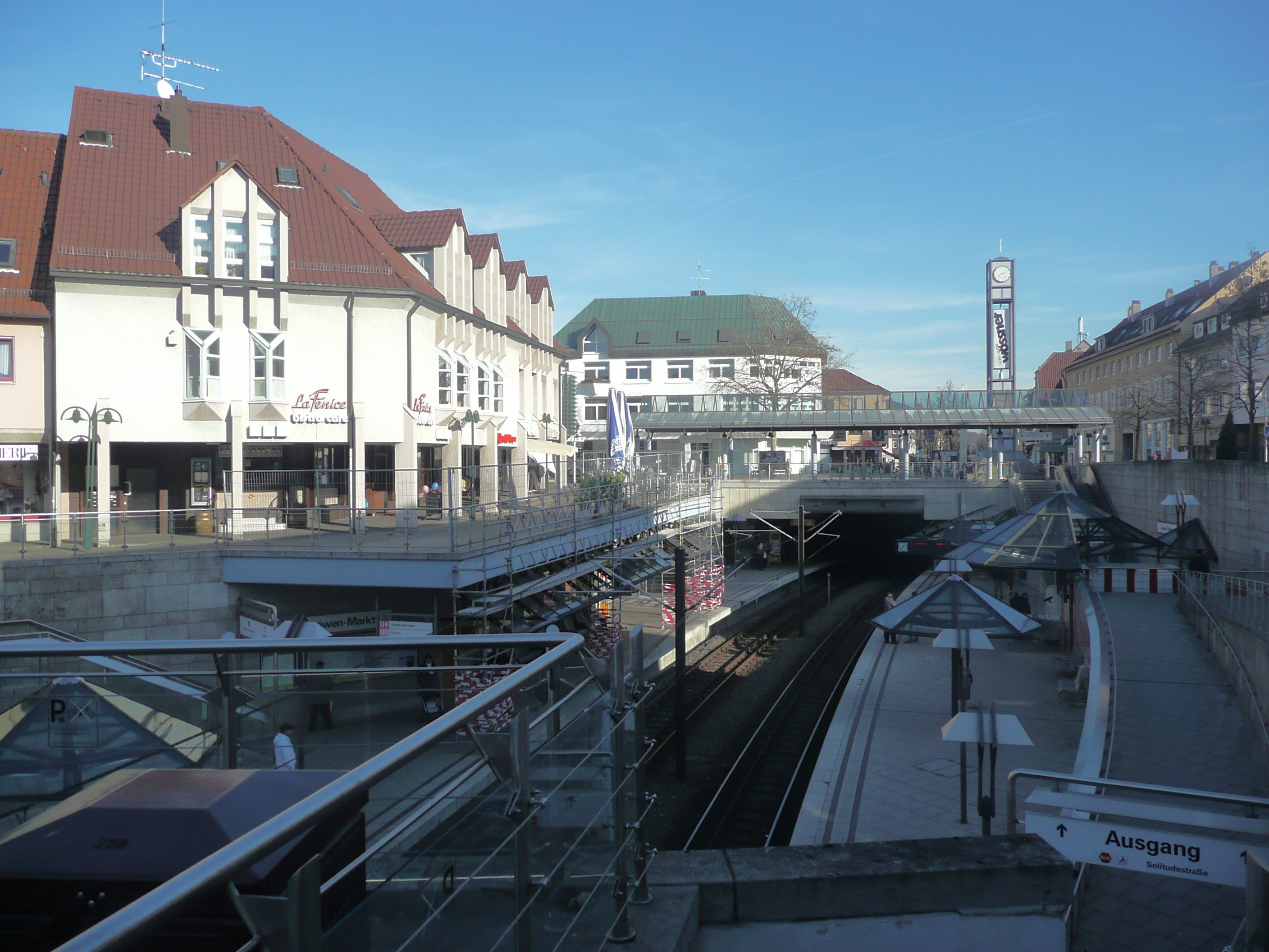 Der Hauptplatz Weilimdorfs: Der Löwen-Markt (mit U-Bahn Station im Vordergrund)